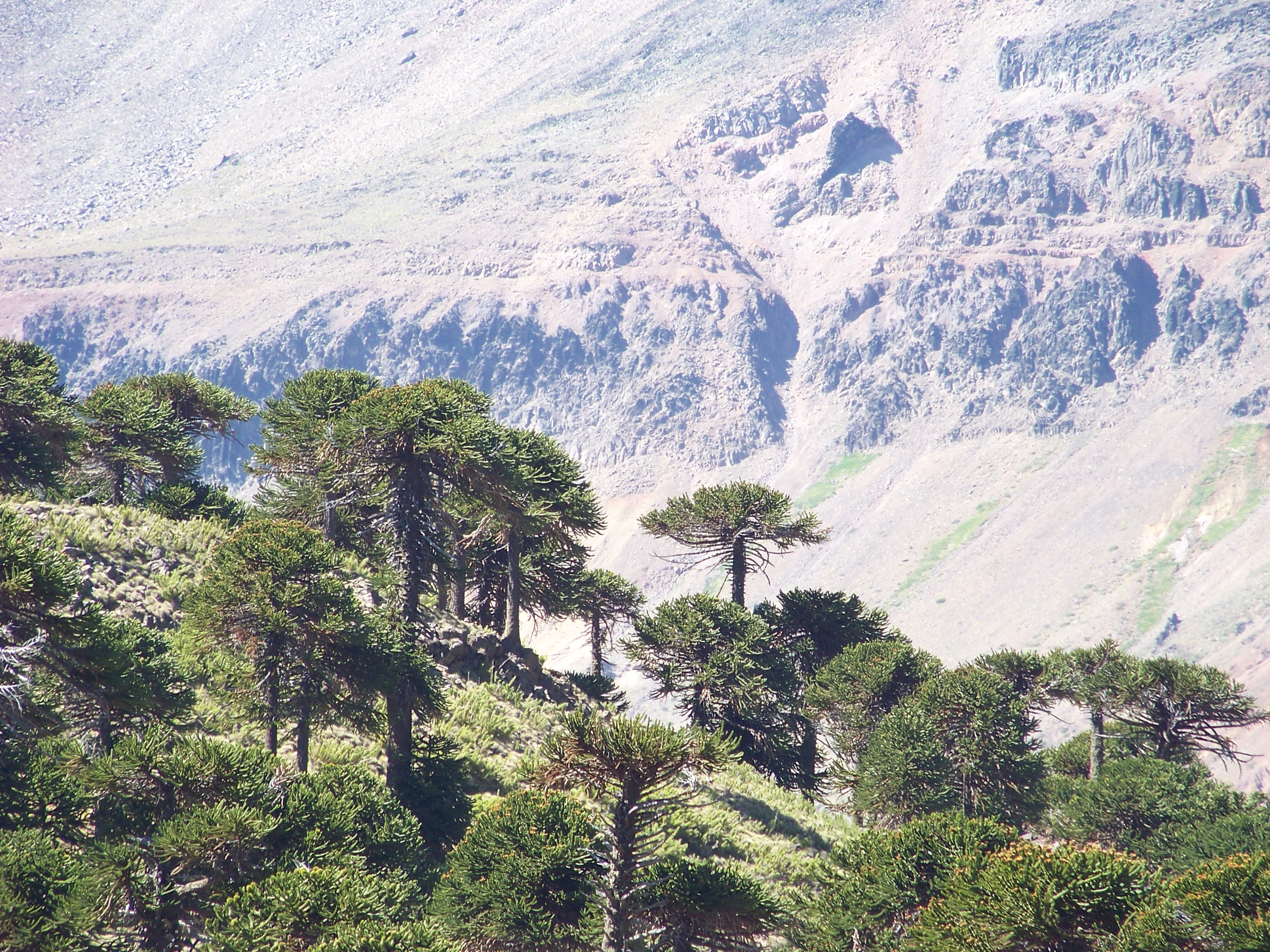 Paisaje en Cochico Grande, montañas y araucarias